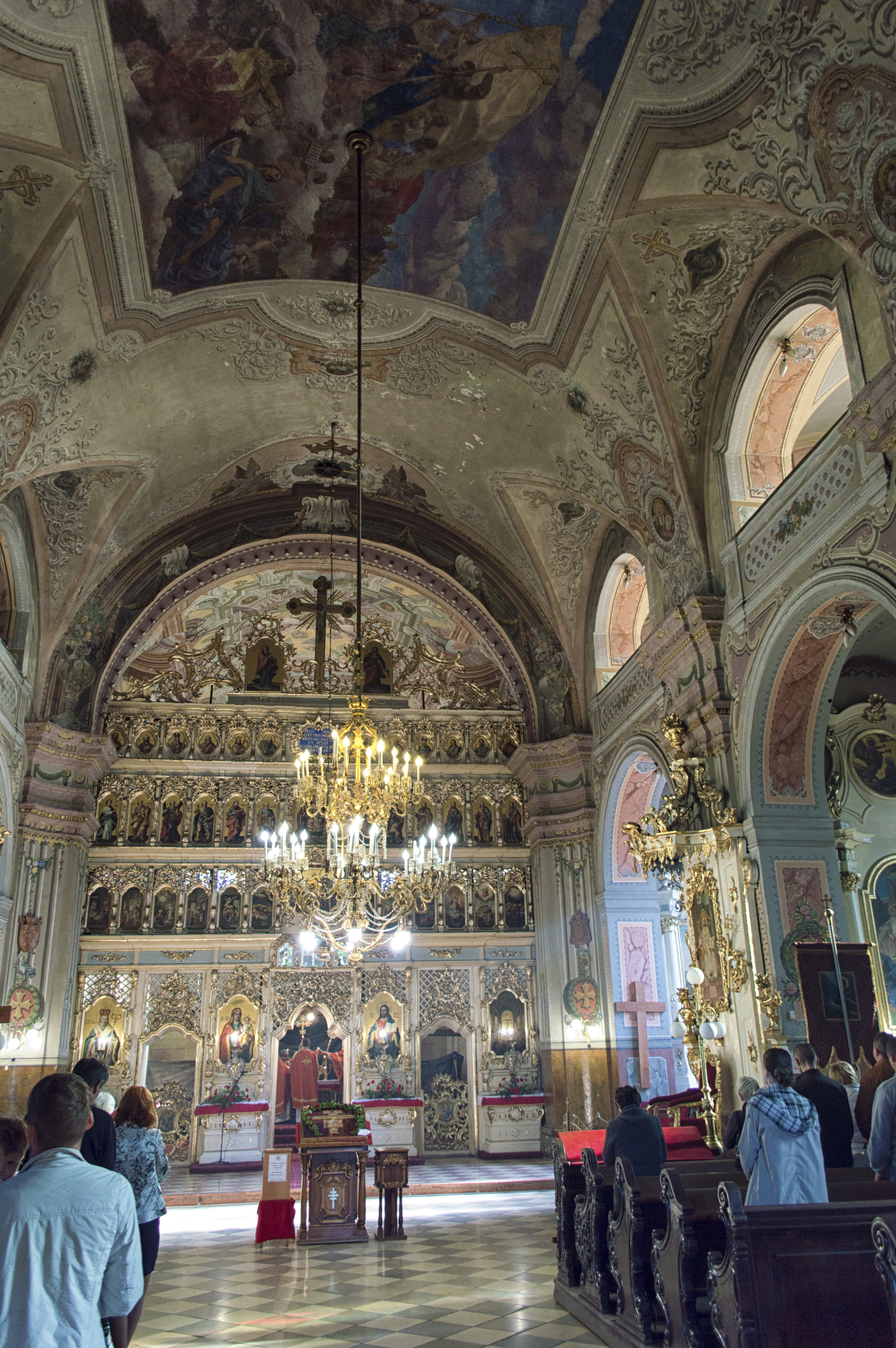 Хрестовоздвиженський собор (мур.), Ужгород, вул.Капітульна, 11